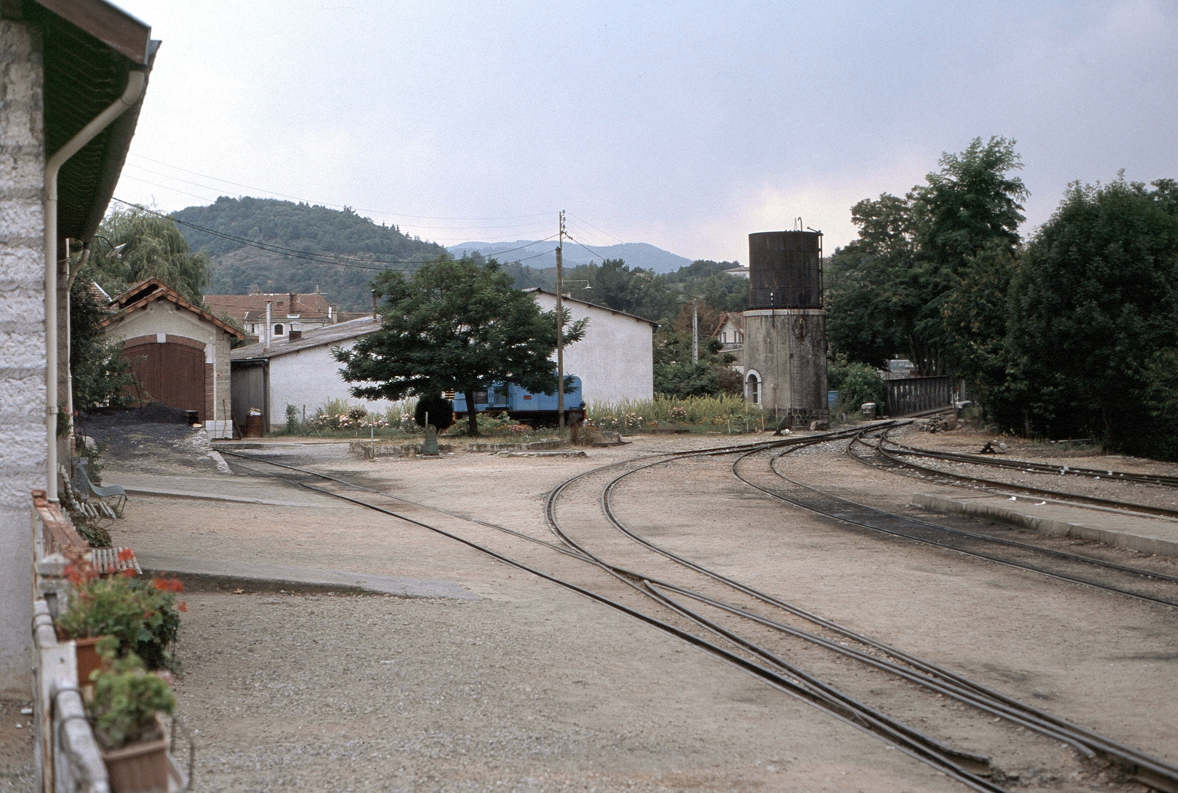 Streckenende Lamastre